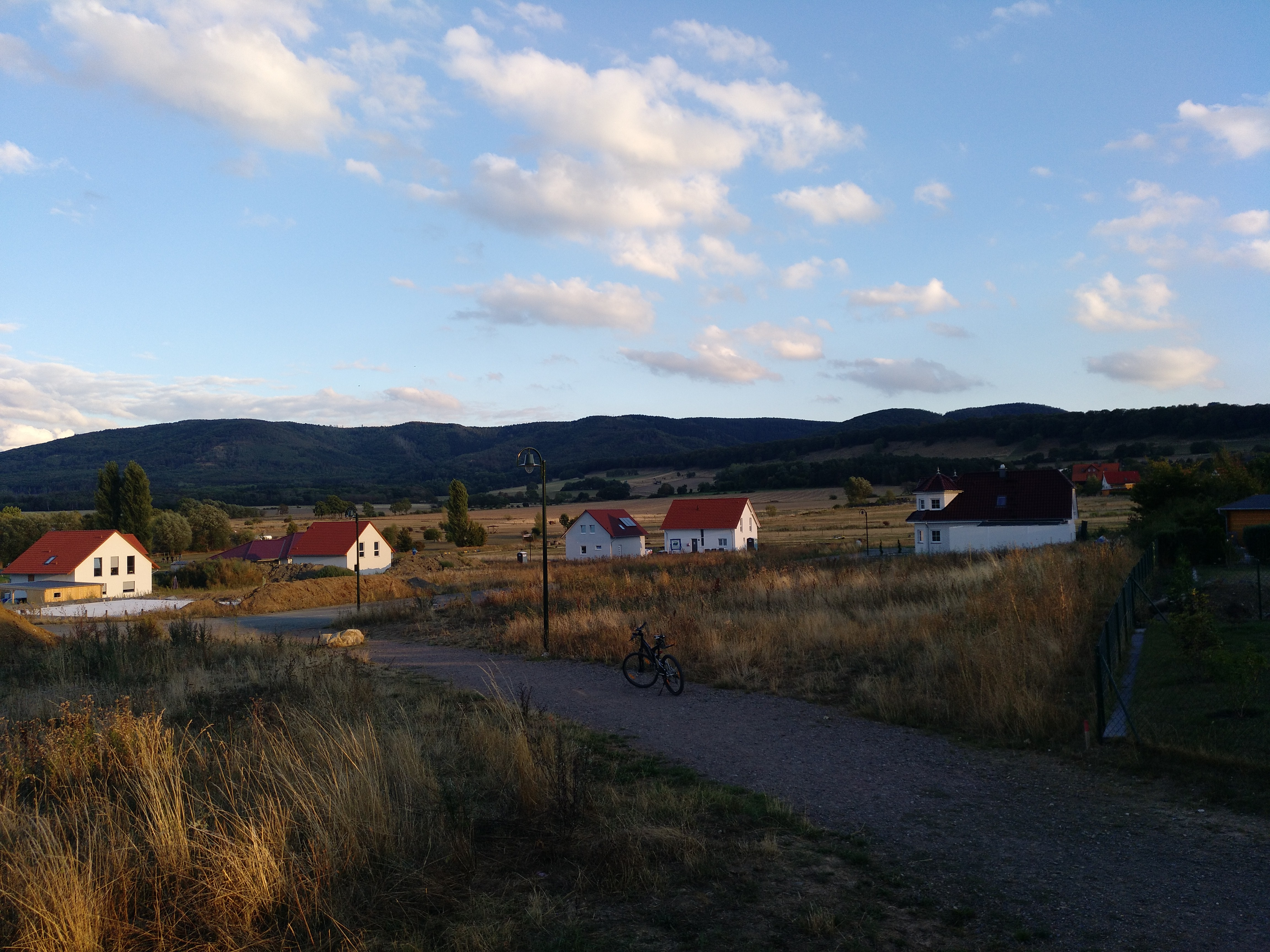 Nordwestblick auf das Neubaugebiet Nicolairing in Westerode; rechts im Hintergrund der Butterberg